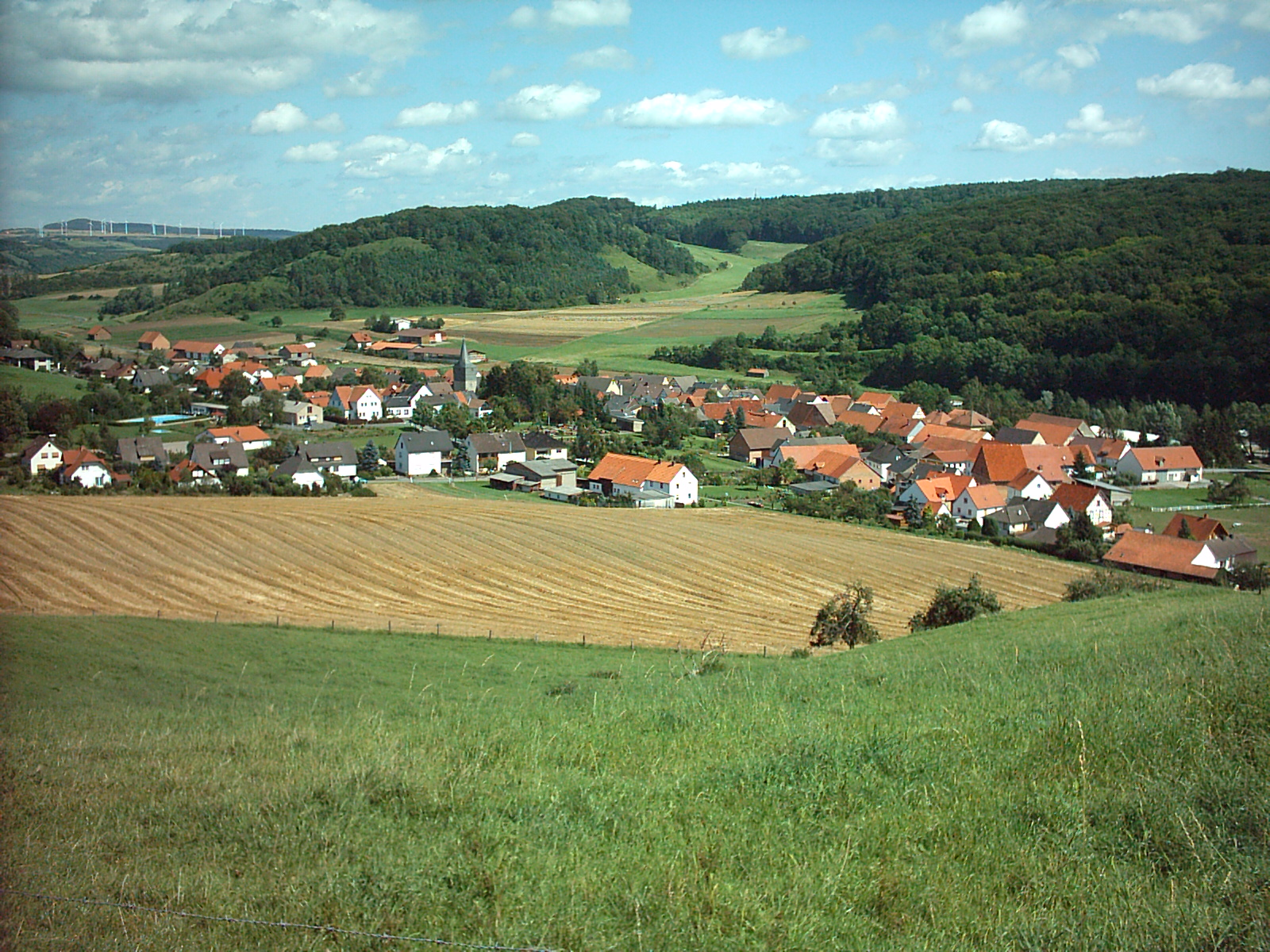 Zwergen von der Colt aus fotografiert.